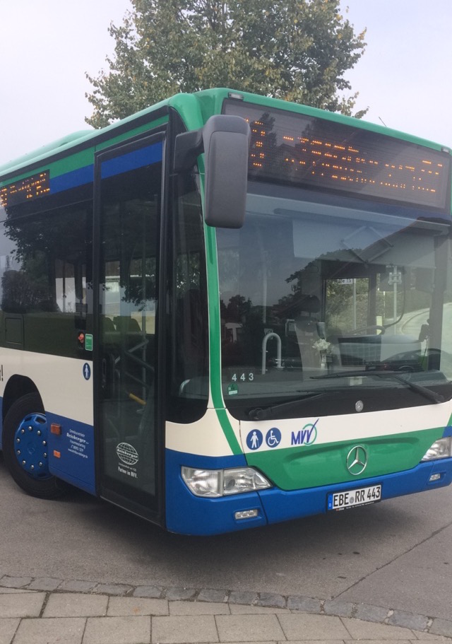 Ein Mercedes Citaro der Firma Reisberger mit MVV-Regionalbuslackierung in Frauenneuharting